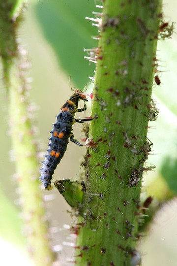 Coccinella septempunctata larva (instar 4)growing up